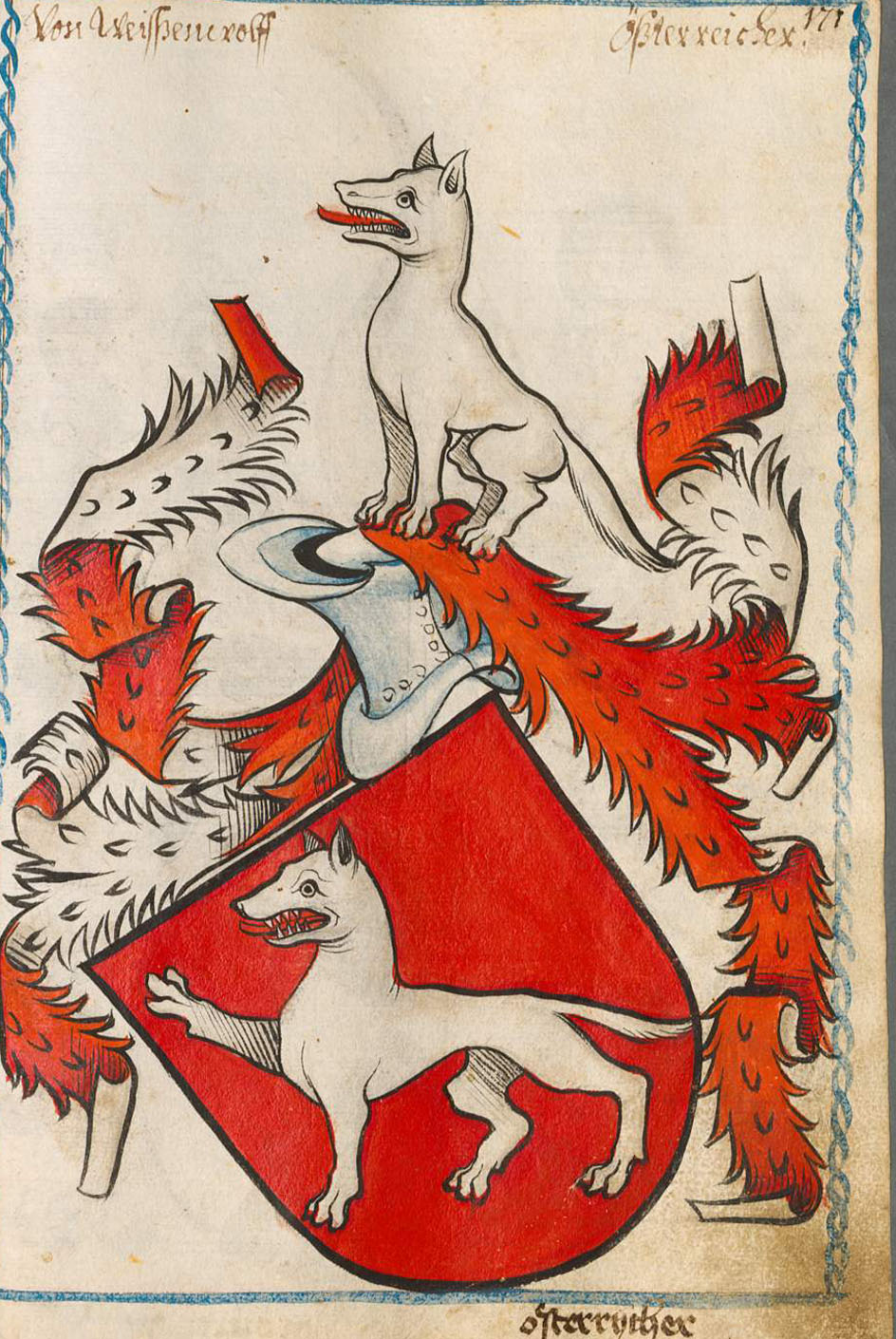 Scheibler'sches Wappenbuch , älterer Teil; Seite 171 Von Weisßenwolff Österreicher